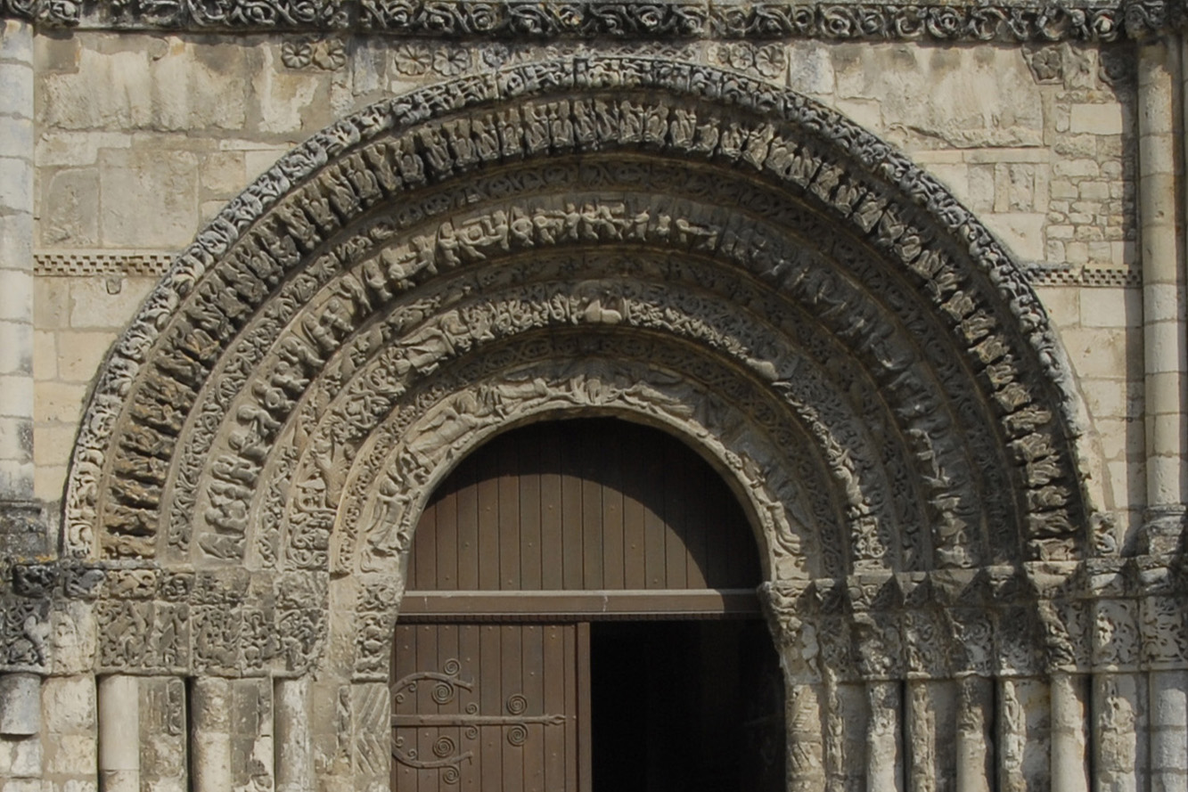 Abbaye aux Dames Saintes, Abteikirche, Archivolten- Hauptportal